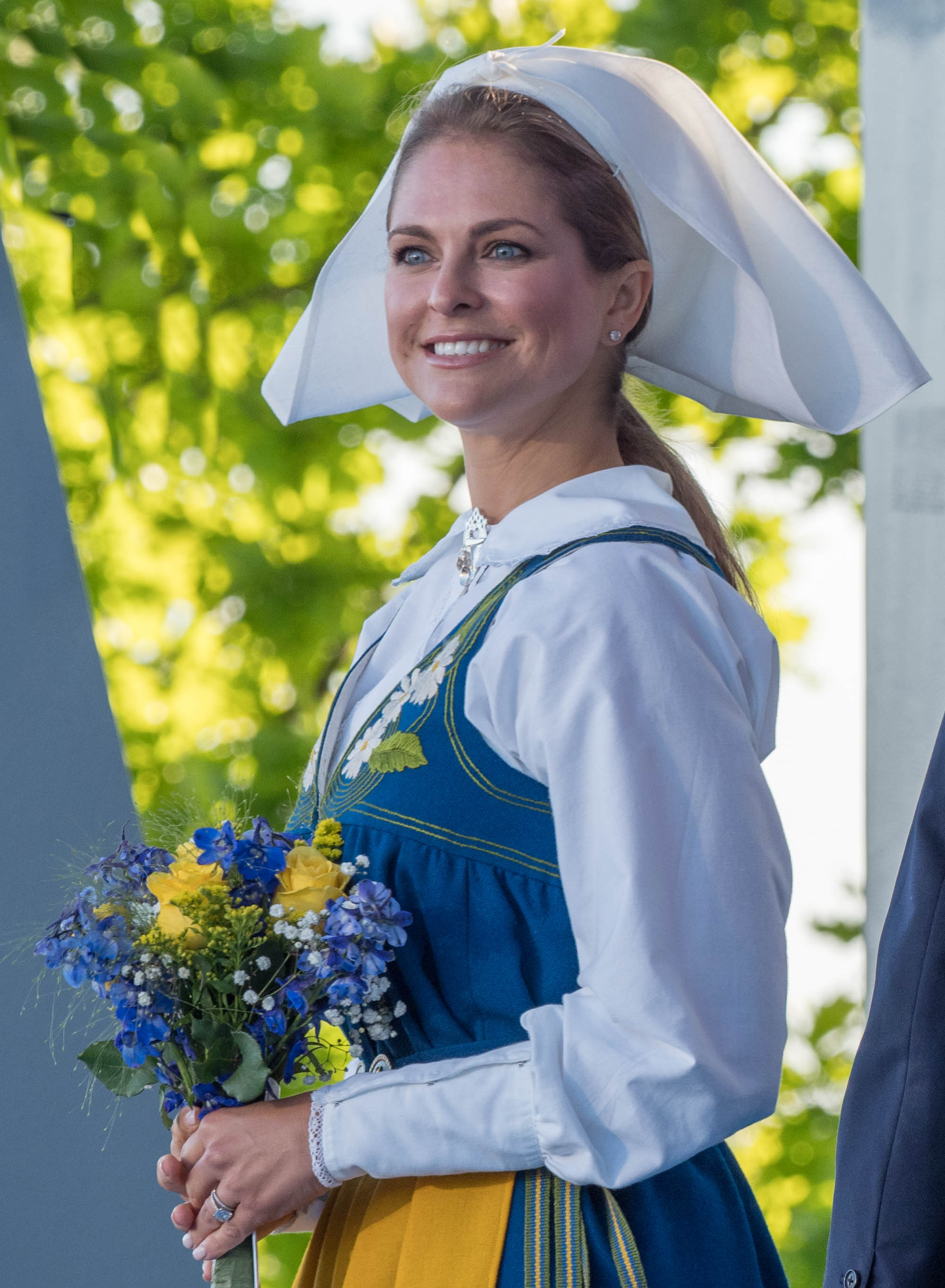 Princess Madeleine